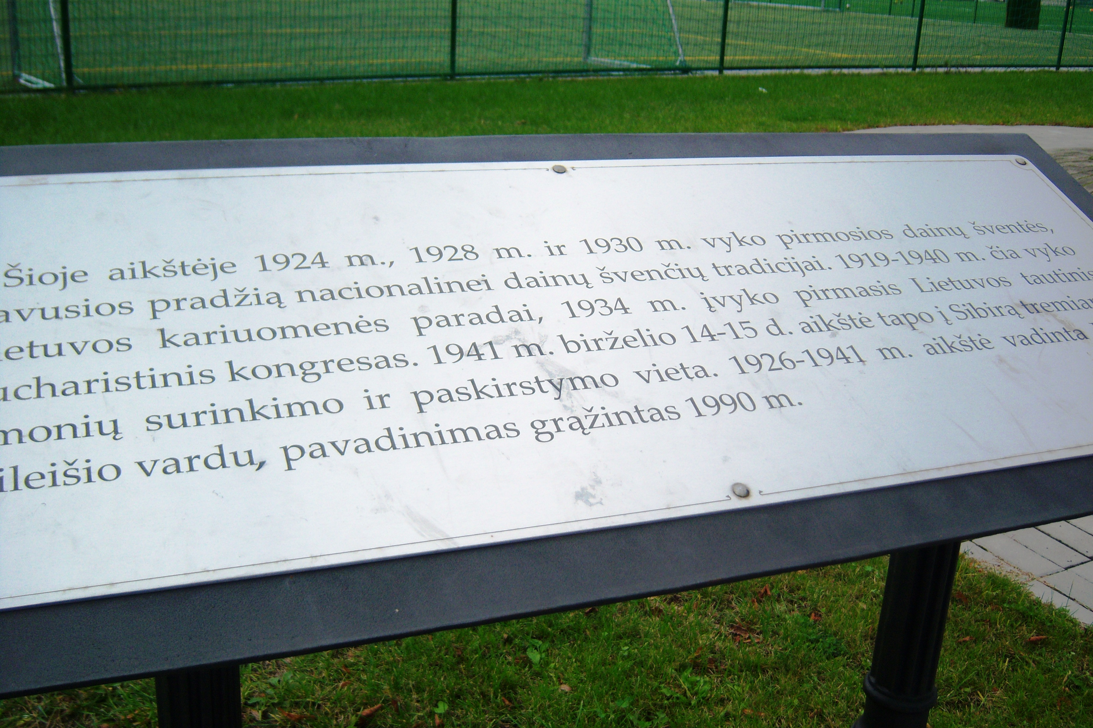 Kauno Petro Vileišio aikštė (Aušros, Petrausko g., futbolo maniežas). Atminimo lenta